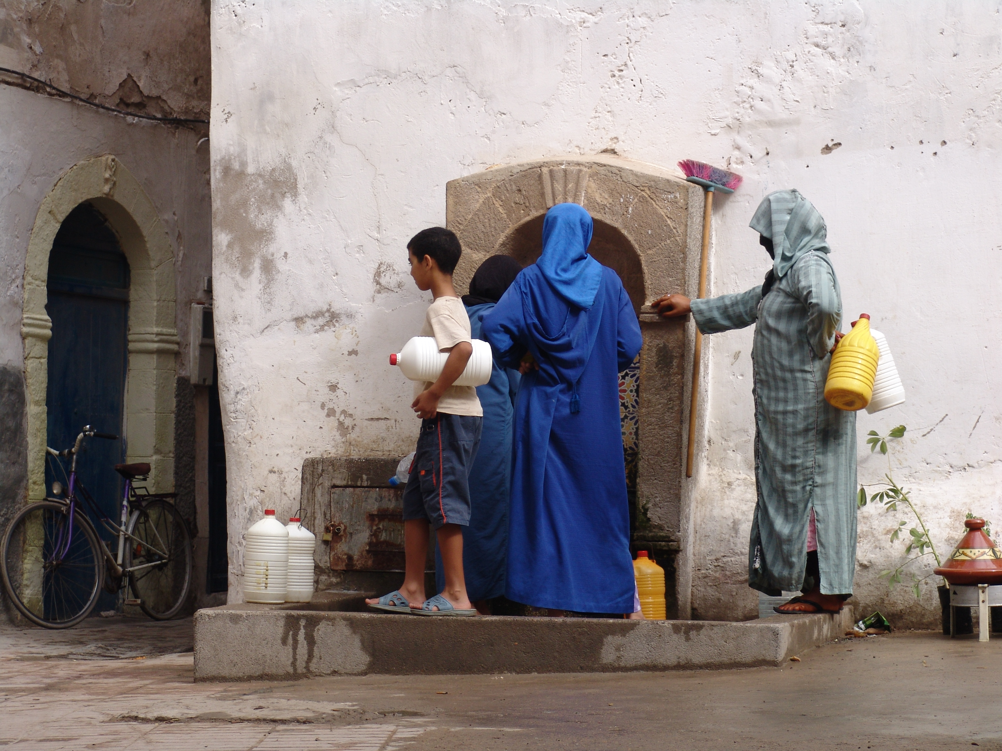 Essaouira - Médina - Une fontaine publique dans le mellah